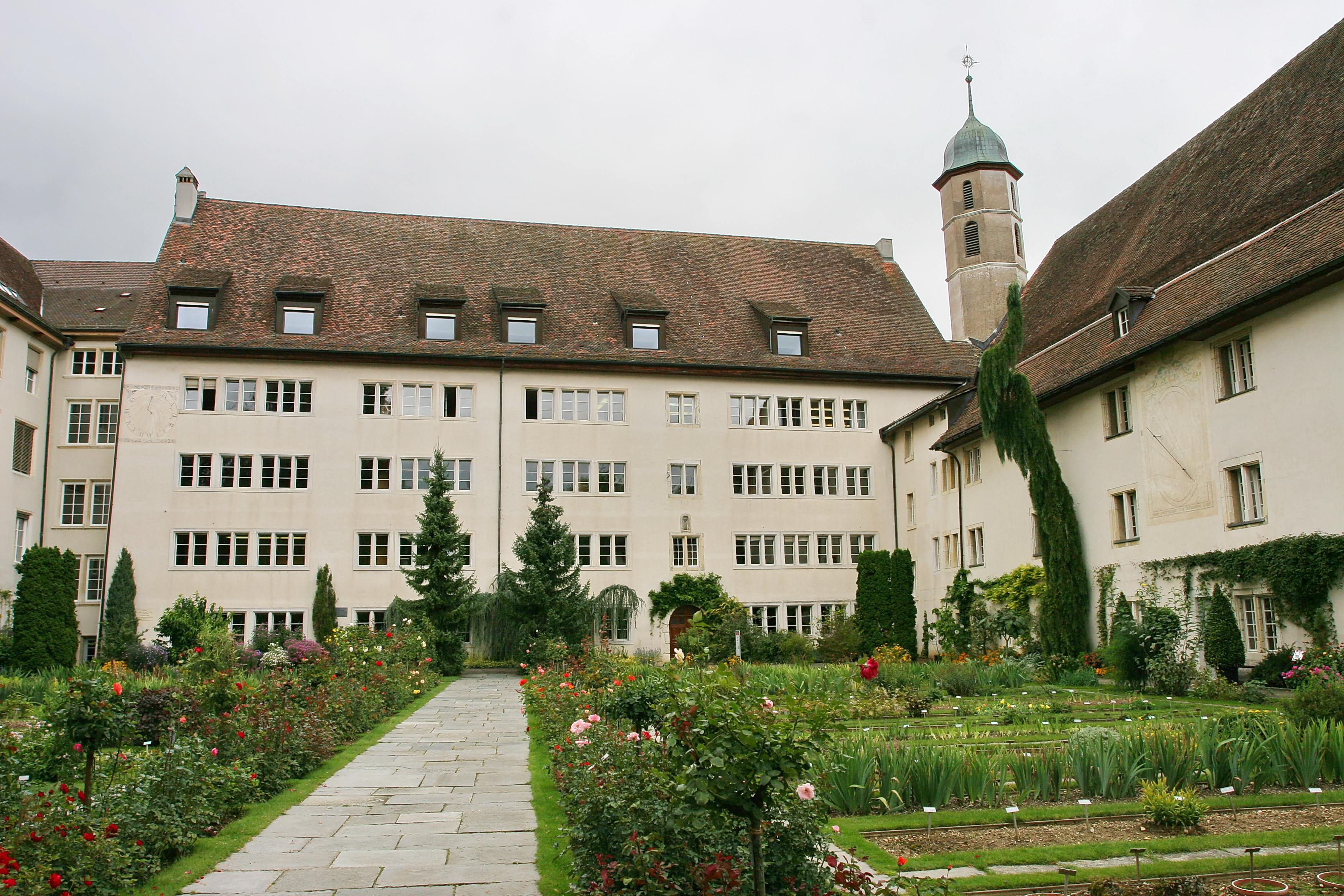 Jardin botanique de Porrentruy et bâtiment du milieu